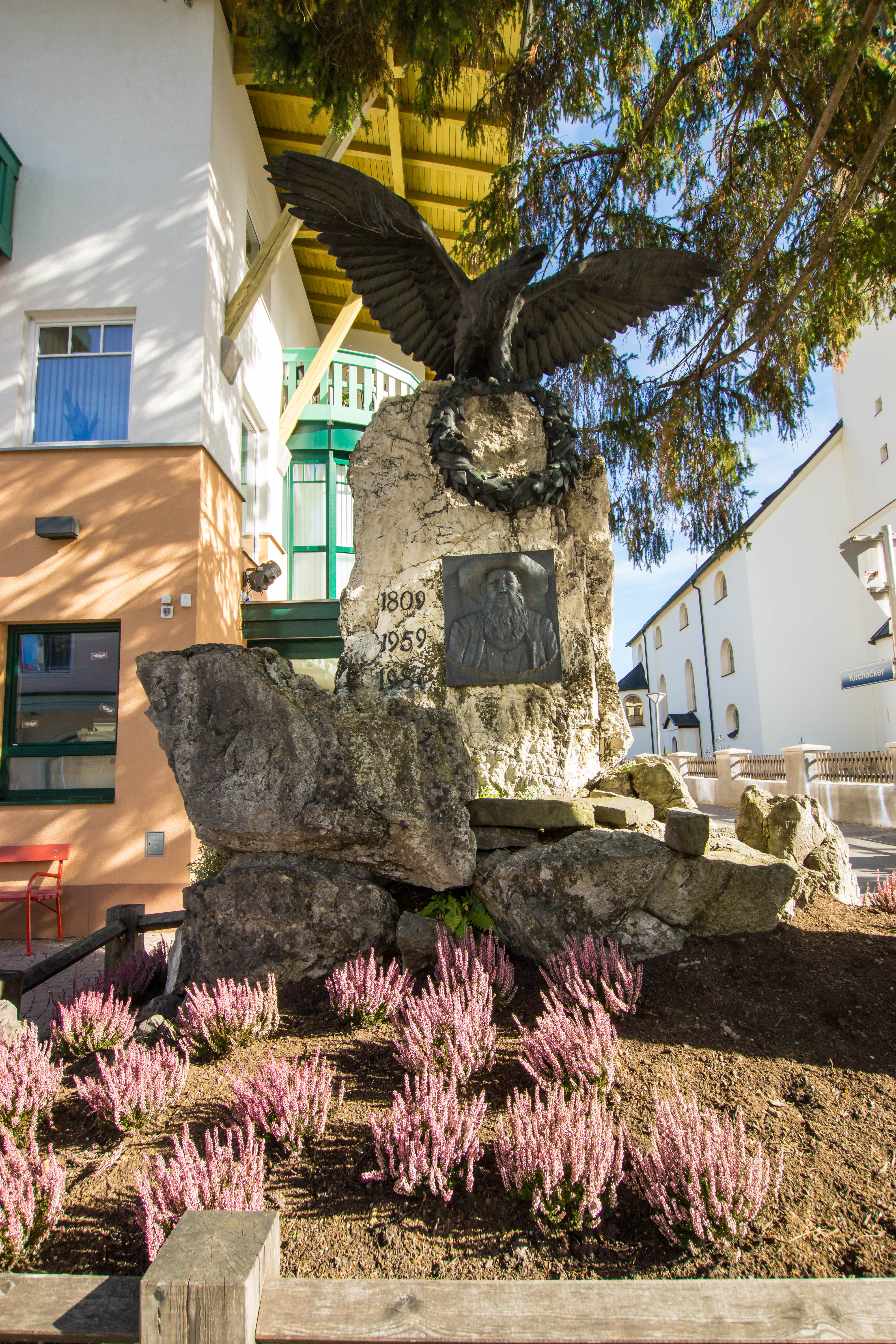 Andreas-Hofer-Denkmal, Tannheim